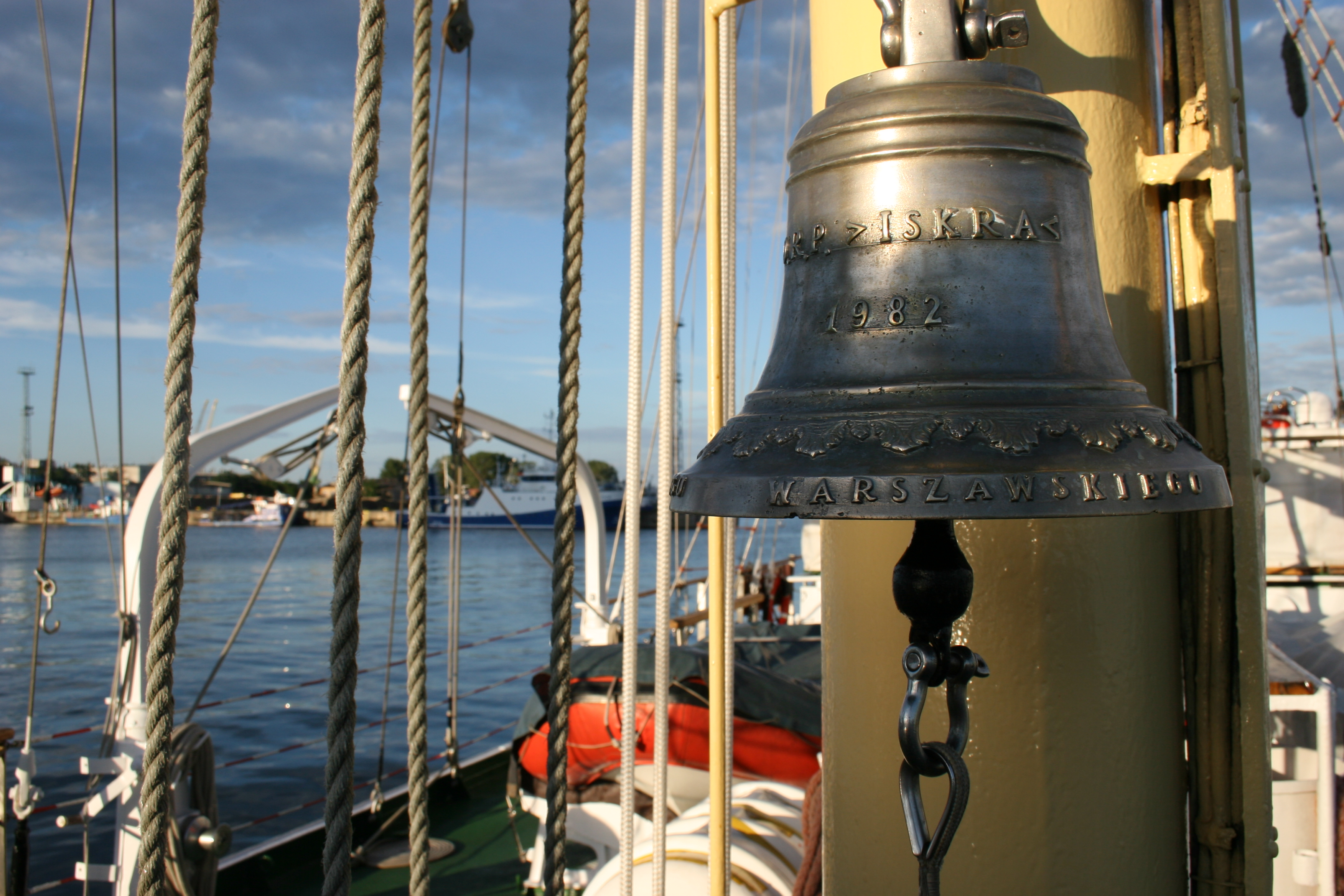 Dzwon ORP Iskra.Zdjęcie zrobione na Skwerze Kościuszki.